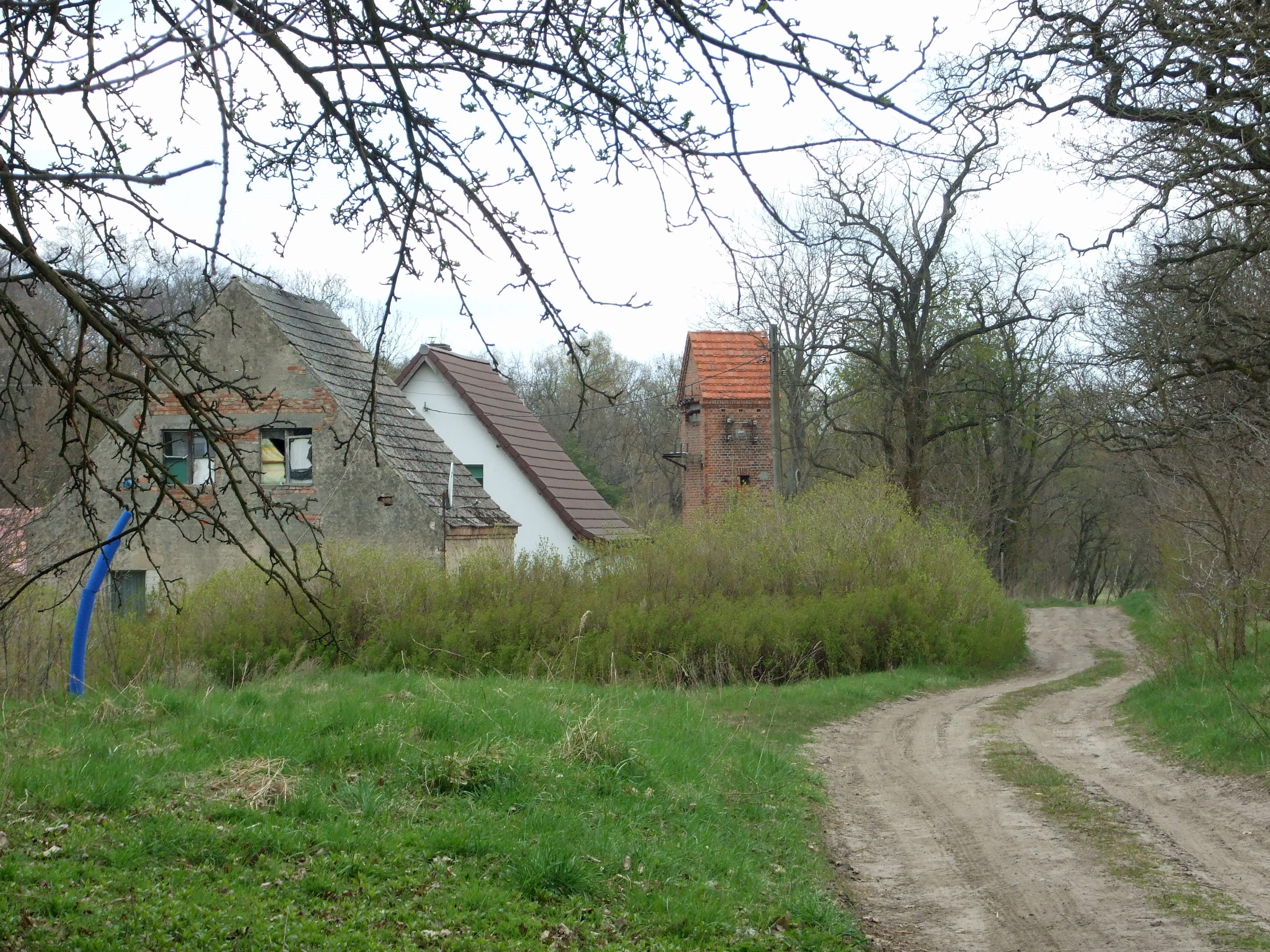 Płochocin